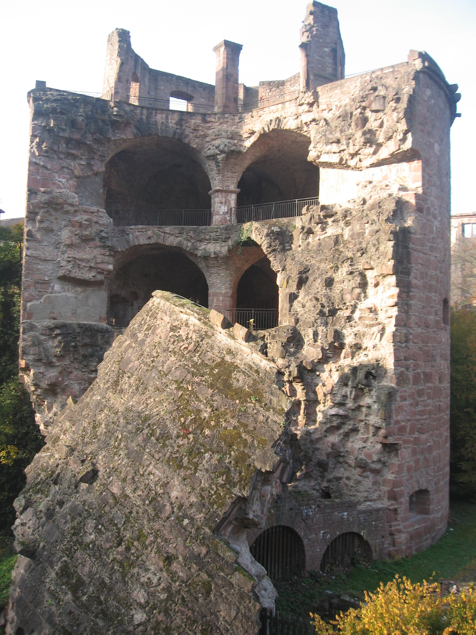 Хайделберг - Замък